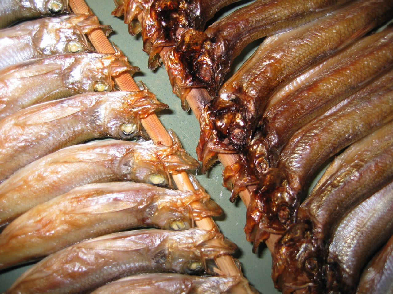 Shi-Sha-Mo